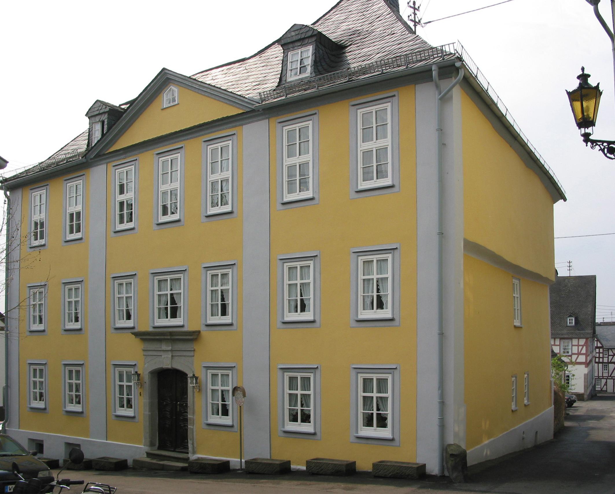 Abbildung zu Albertine Von Grün